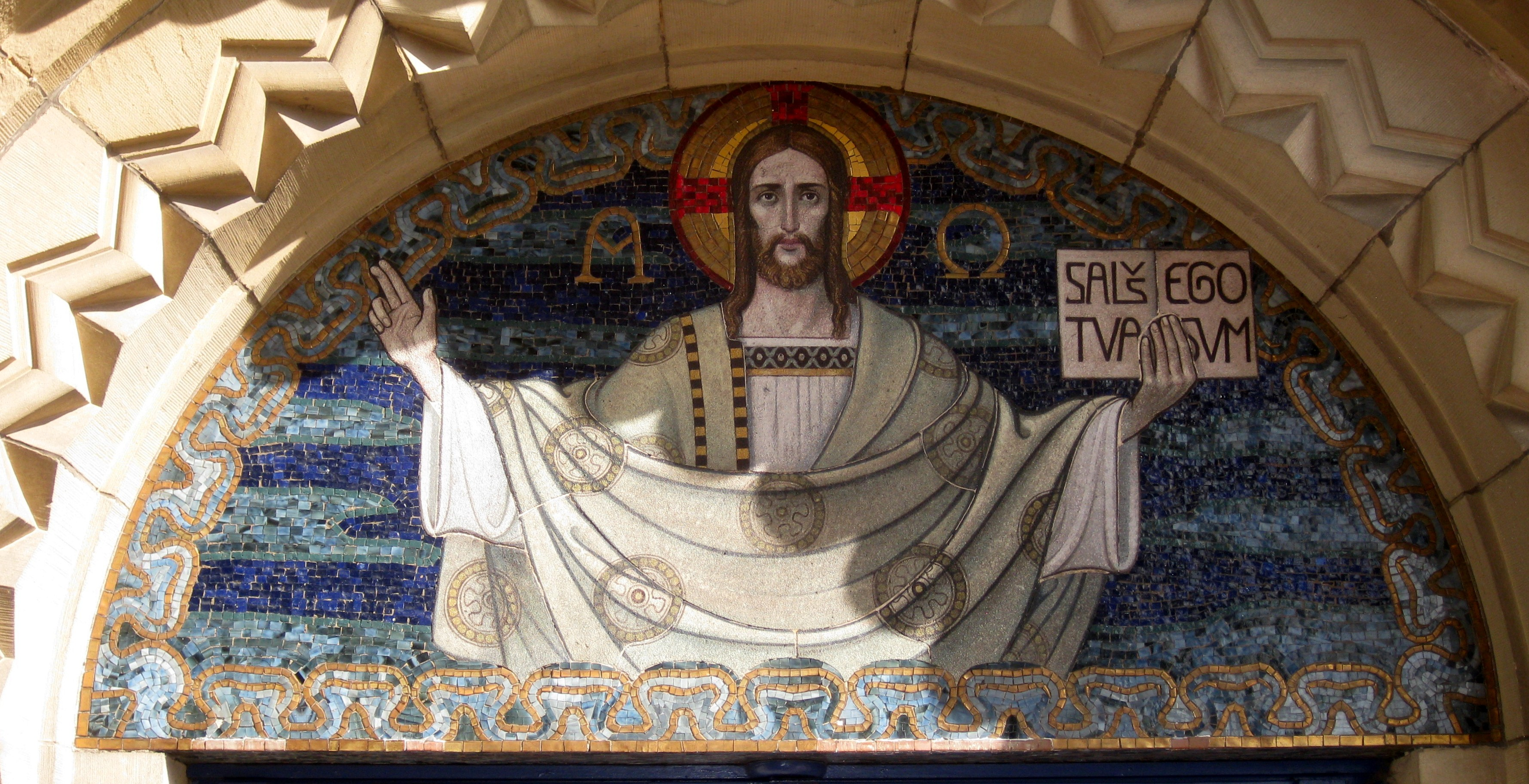 Mosaik über dem Eingang zur Dionysisuskirche in Debstedt, Christus als Weltenherrscher